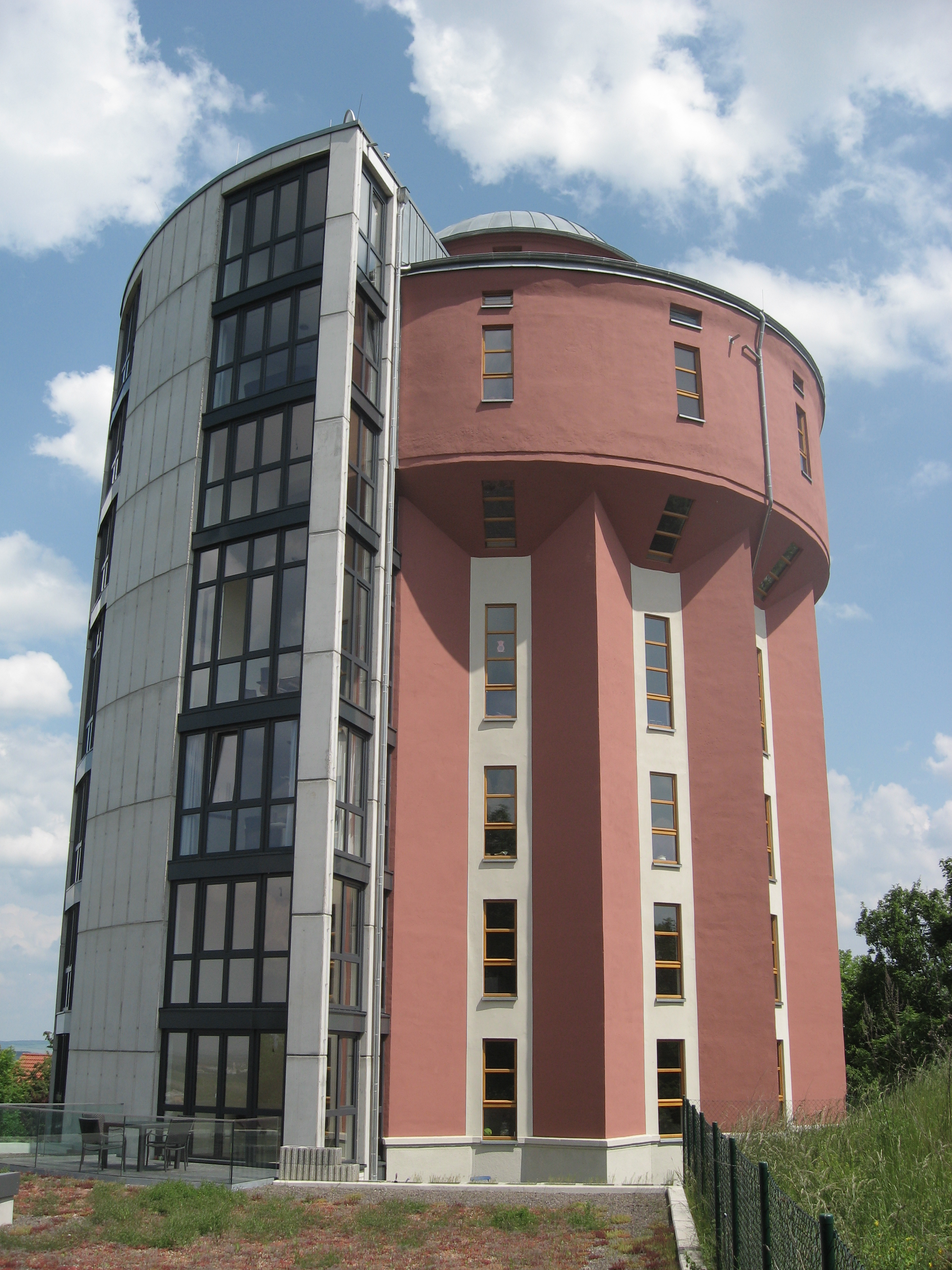 Wasserturm in Arnstadt, heute Wohnhaus.